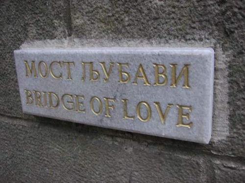 Bridge of Love in Vrnjacka Banja